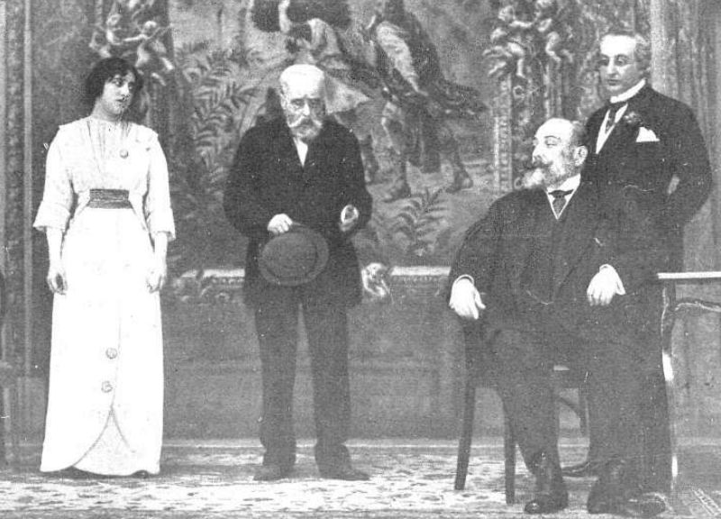 Los actores María Fernanda Ladrón de Guevara, Ernesto Vilches, Alfredo Cirera y Emilio Thuillier en una escena de la obra de teatro La fuerza del mal (1914), de Manuel Linares Rivas